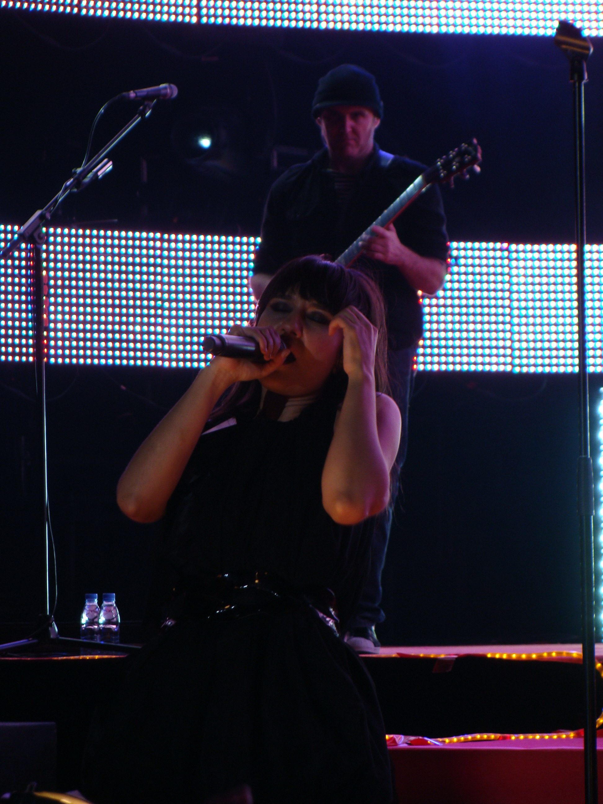 Eva Amaral